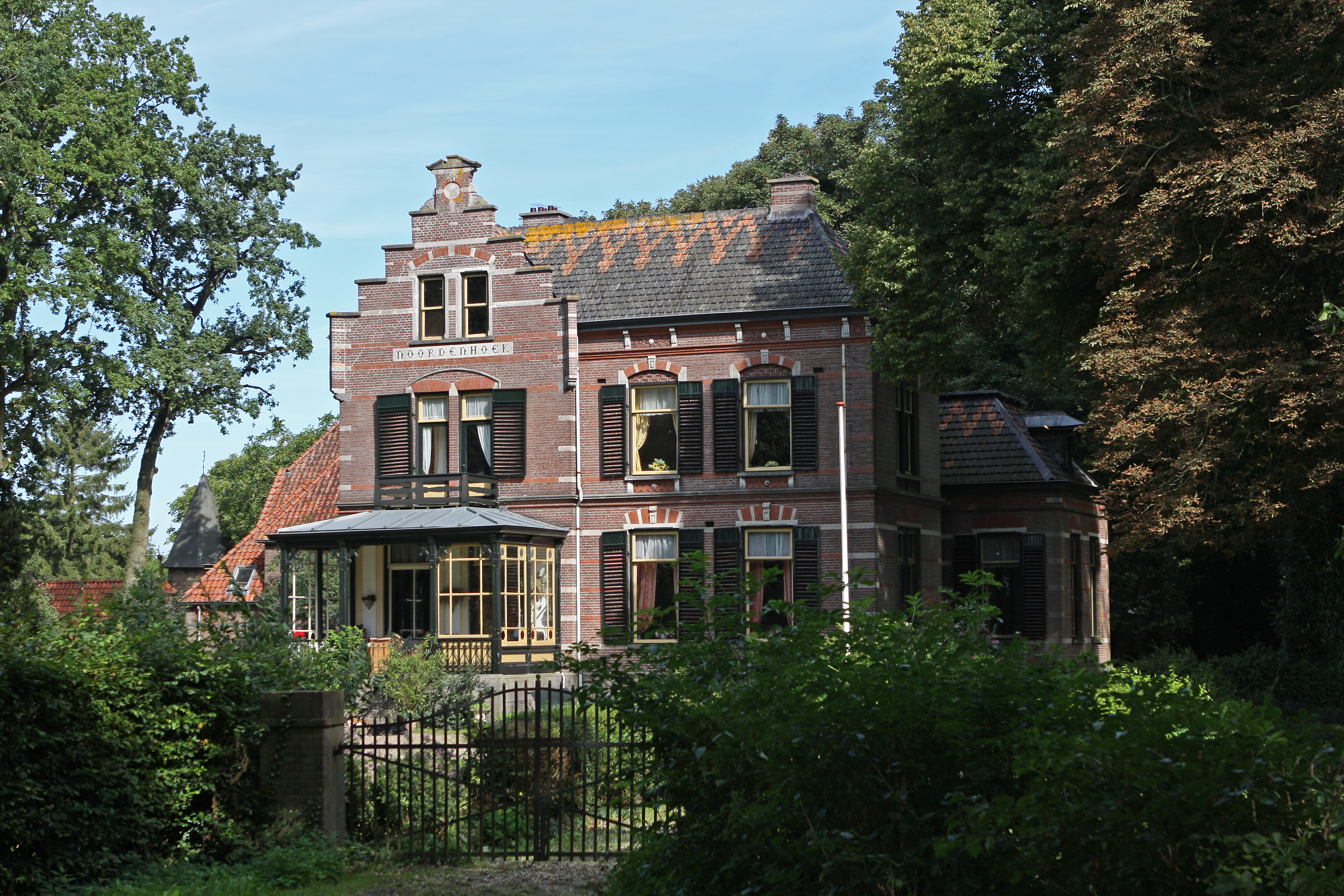 Kasteel Noordenhoek, Deil